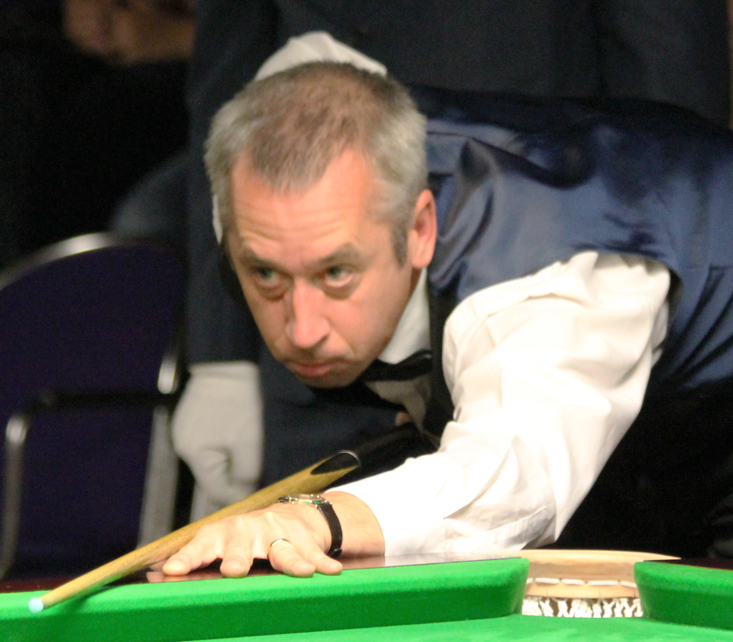 Nigel Bond beim Paul Hunter Classic 2012